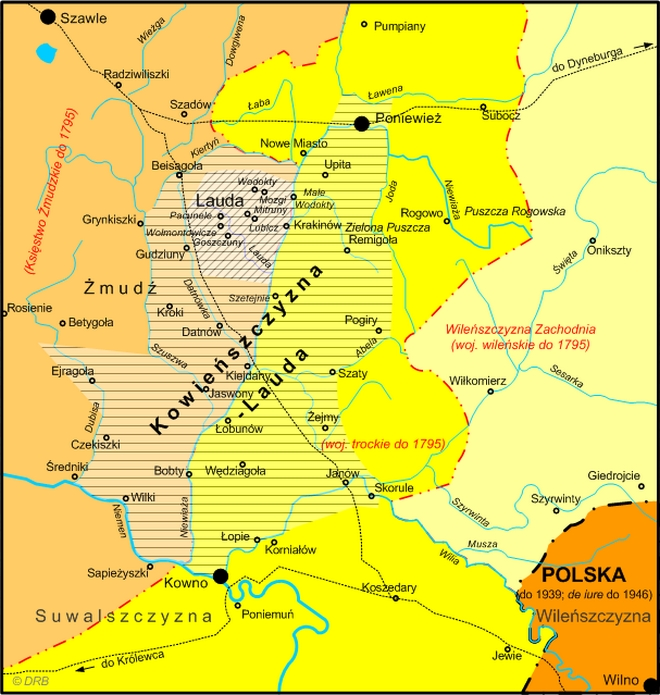 Lauda (Mała) Sienkiewiczowska (do końca XIX wieku) i Lauda-Kowieńszczyzna (XX wiek)